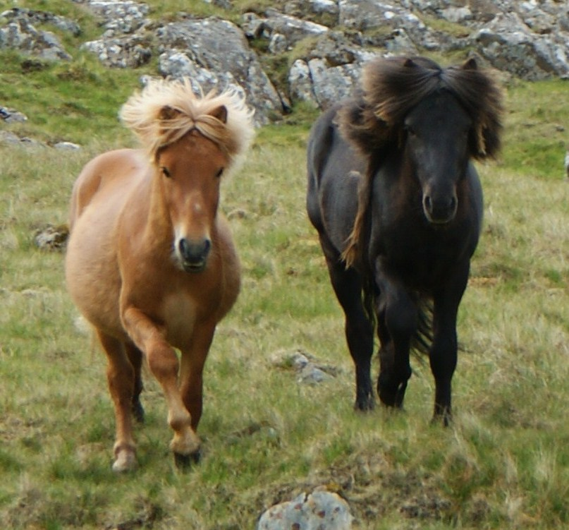 2 færøske hingste